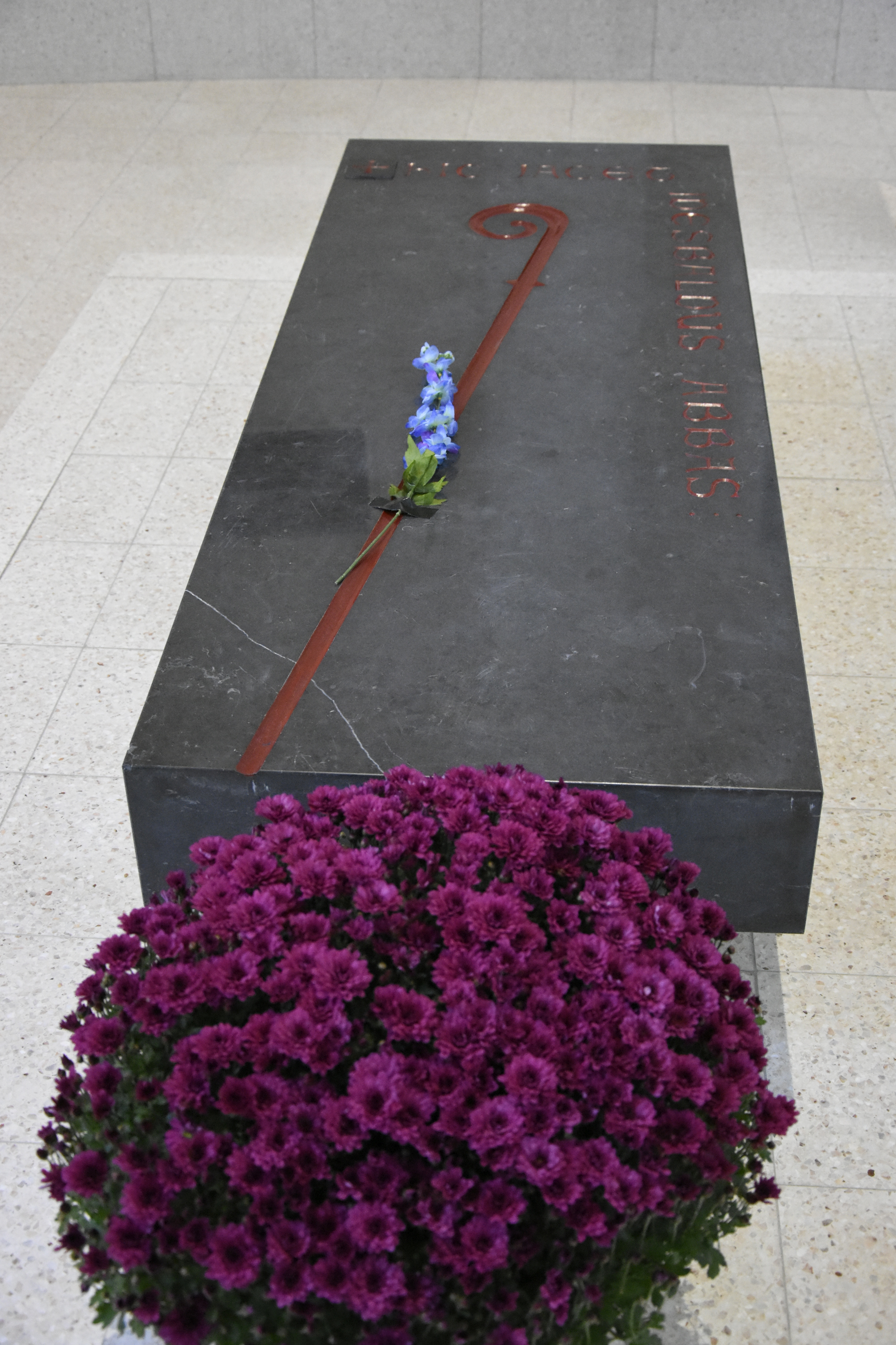 Praalgraf Idesbaldus Onze-Lieve-Vrouw-ter-Duinenkerk (Koksijde) 27-10-2017 This photo of immovable heritage has been taken in the Flemish Region